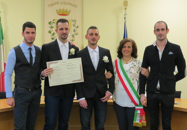 Olginate: Emanuele Locatelli e Mirko Sangalli prima unione civile in paese